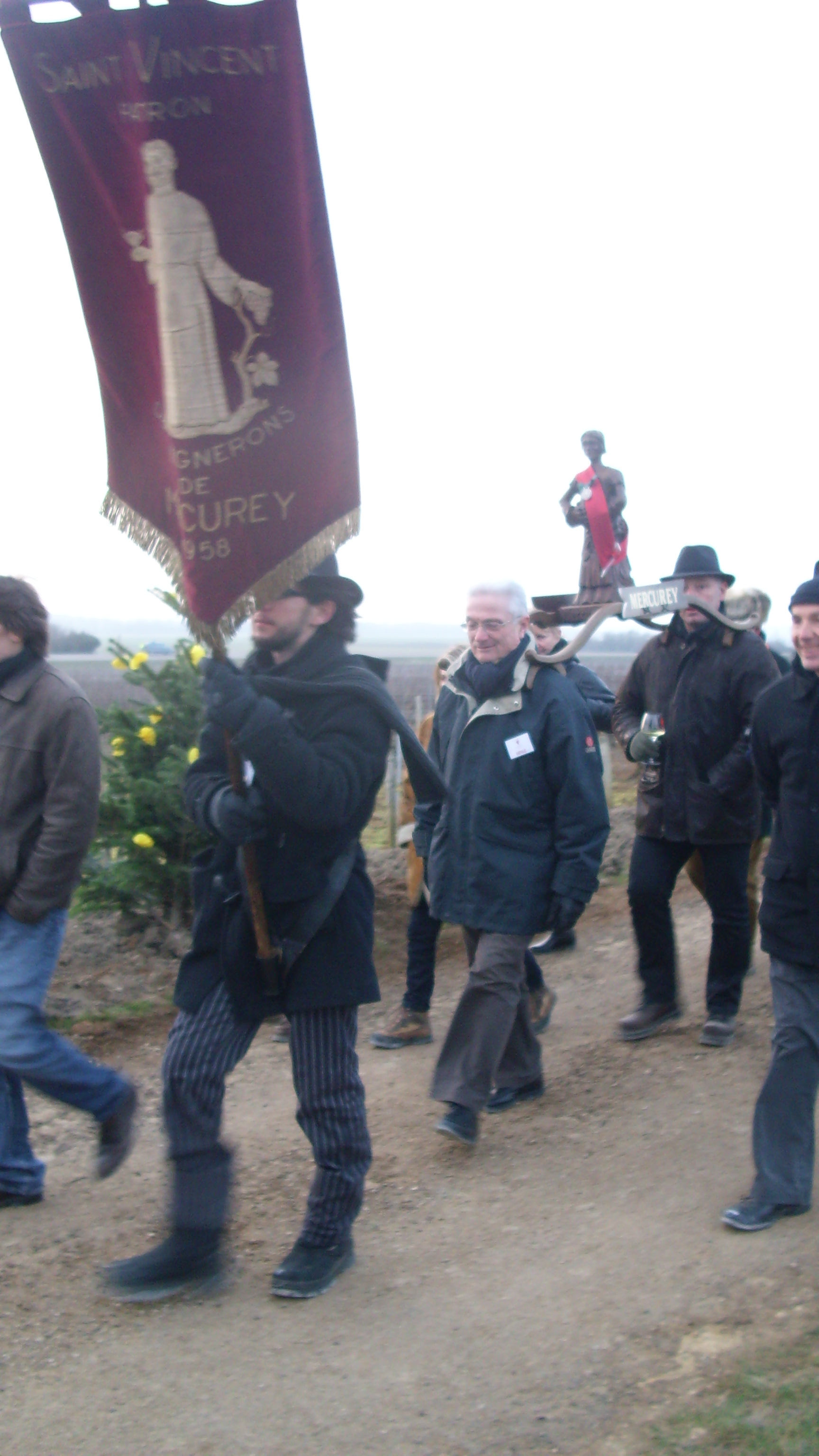 Délégation de Mercurey portant le saint-vincent de Mercurey à la St Vincent tournante de Corgoloin (21)